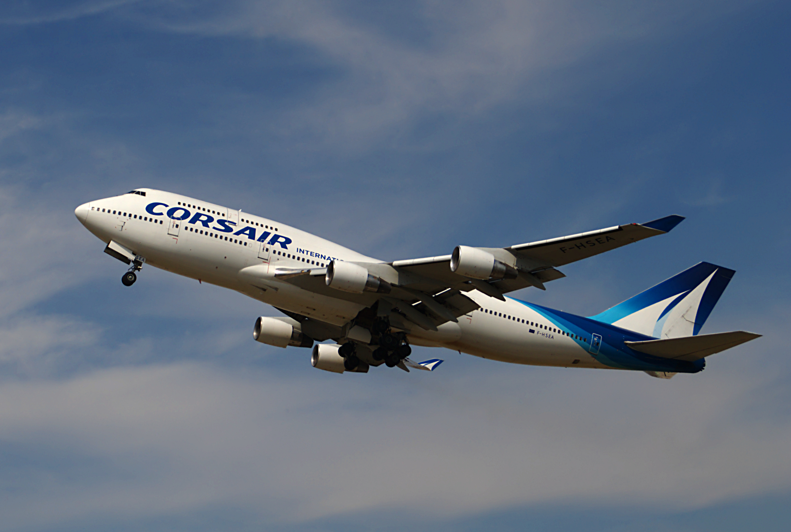 Avion à l'aéroport d'Orly - Paris